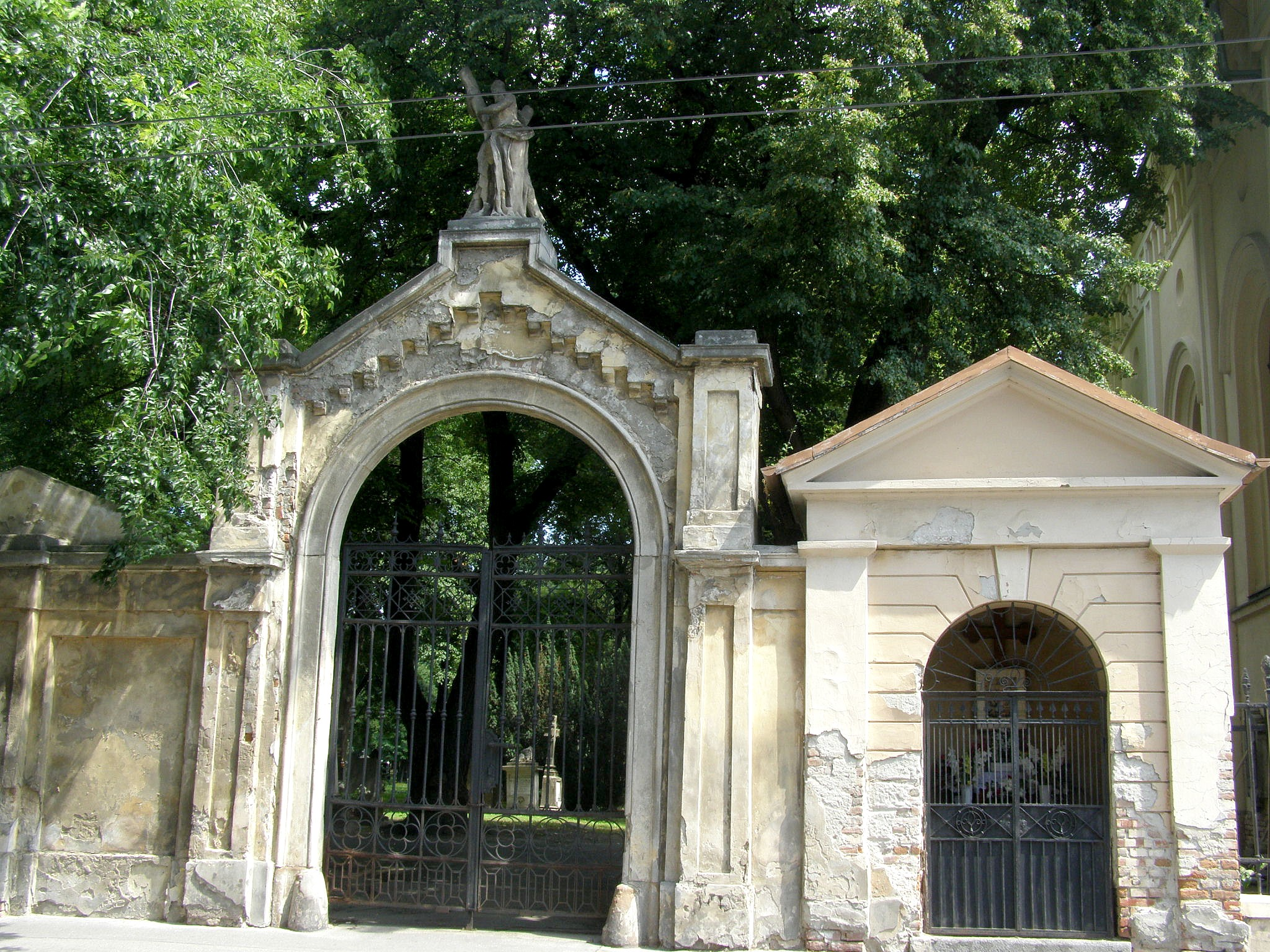 Vlazd do areálu Ondrejského cintorína z ulice 29. augusta. Završuje ho plastika svätého Ondreja. Vpravo je kaplnka, ktorá pôvode stála na Dunajskej ulici